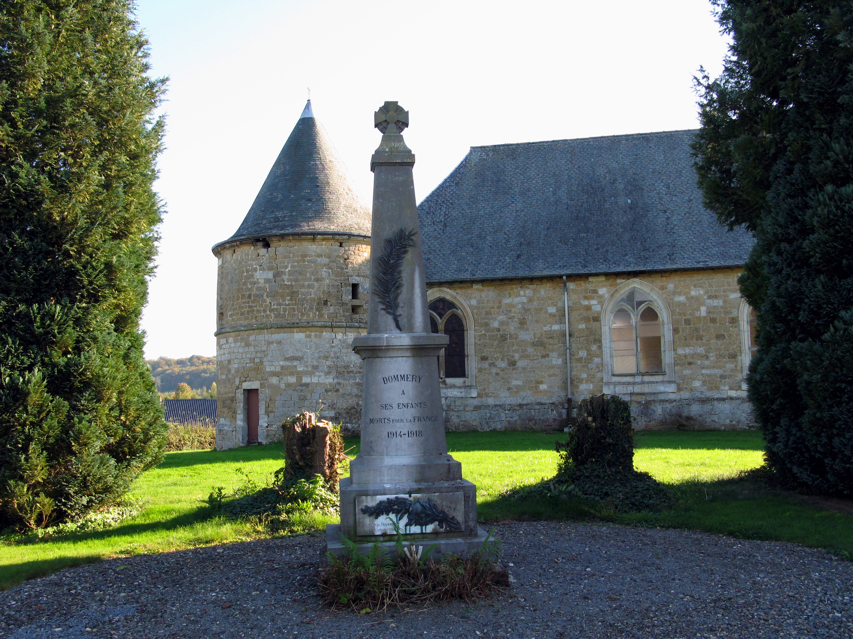 Dommery (Ardennes, France) - Le monument-aux-morts et l'église fortifiée. On remarque que la tour d'angle de l'église est assez fissurée.